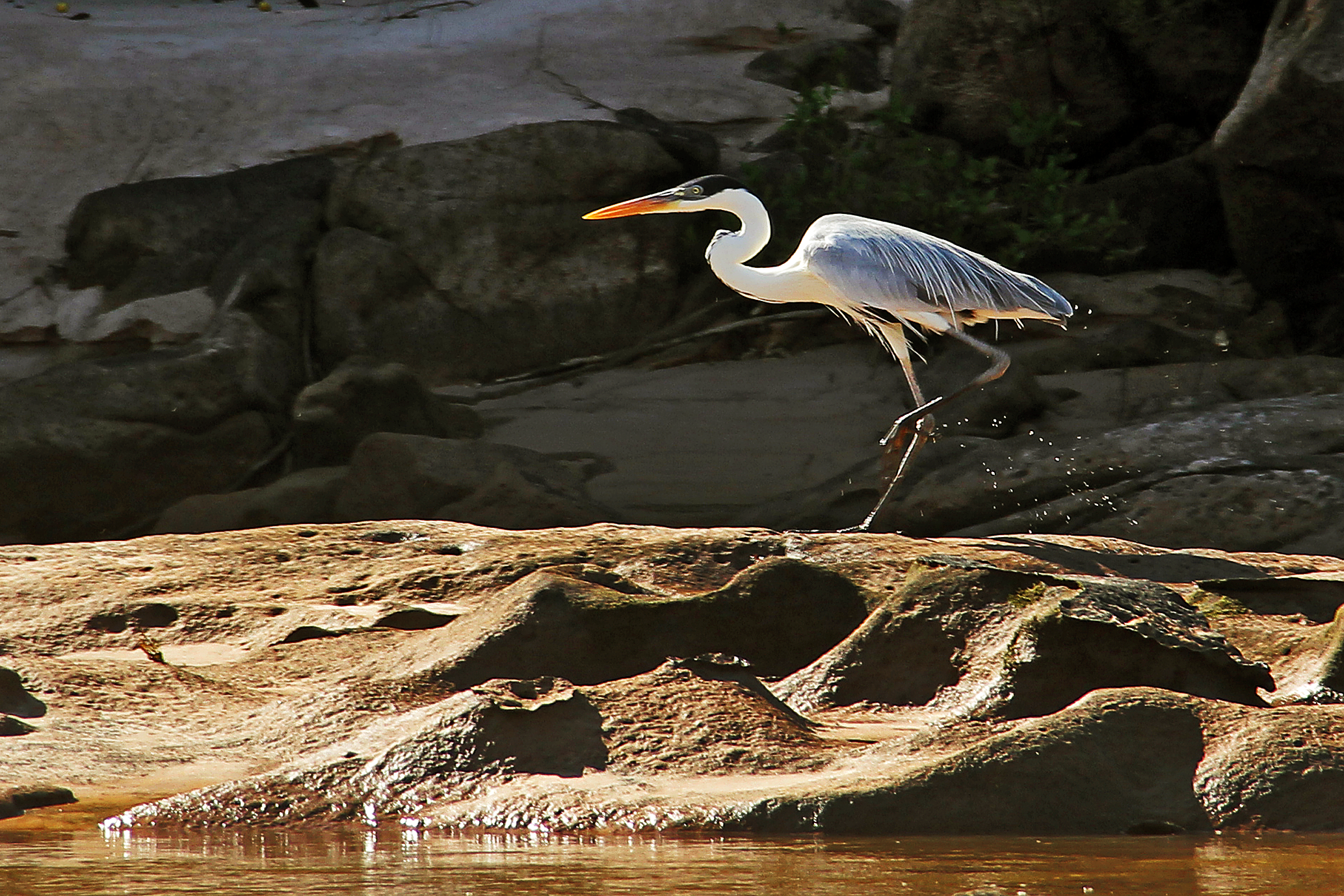 A garça é uma ave ciconiforme que habita áreas próximas a rios, lagos, praias marítimas, manguezais e estuários.Vivem em regiões tropicais e subtropicais de todos os continentes, exceto Antártida.A maioria das espécies de garças possui penas brancas cobrindo todo corpo e pescoço longo.Os bicos grandes das garças podem variar de cor dependendo da espécie,porém, as cores de bicos mais comuns são amarela, marrom e preta.Medem entre 70 e 85 cm de altura.Pesam, em média, de 3 a 5 quilos de acordo com a espécie. Alimenta-se basicamente de peixes, pequenos anfíbios, crustáceos e outras espécies de animais aquáticos de pequeno porte O rio Araguaia nasce no município de Mineiros no sudoeste do estado de Goiás e forma a divisa natural entre Goiás, Mato Grosso, Tocantins e Pará. Compreende uma das principais bacias hidrográficas do centro-oeste, a bacia hidrográfica Araguaia-Tocantins. O rio conta com uma extensão total de 2.114 km. Em seu percurso seus meandros delimitam juntamente como os do Rio Javaés, a maior ilha fluvial do mundo, a Ilha do Bananal, onde encontram localizados o Parque Nacional do Araguaia e o Parque Indígena do Araguaia. .